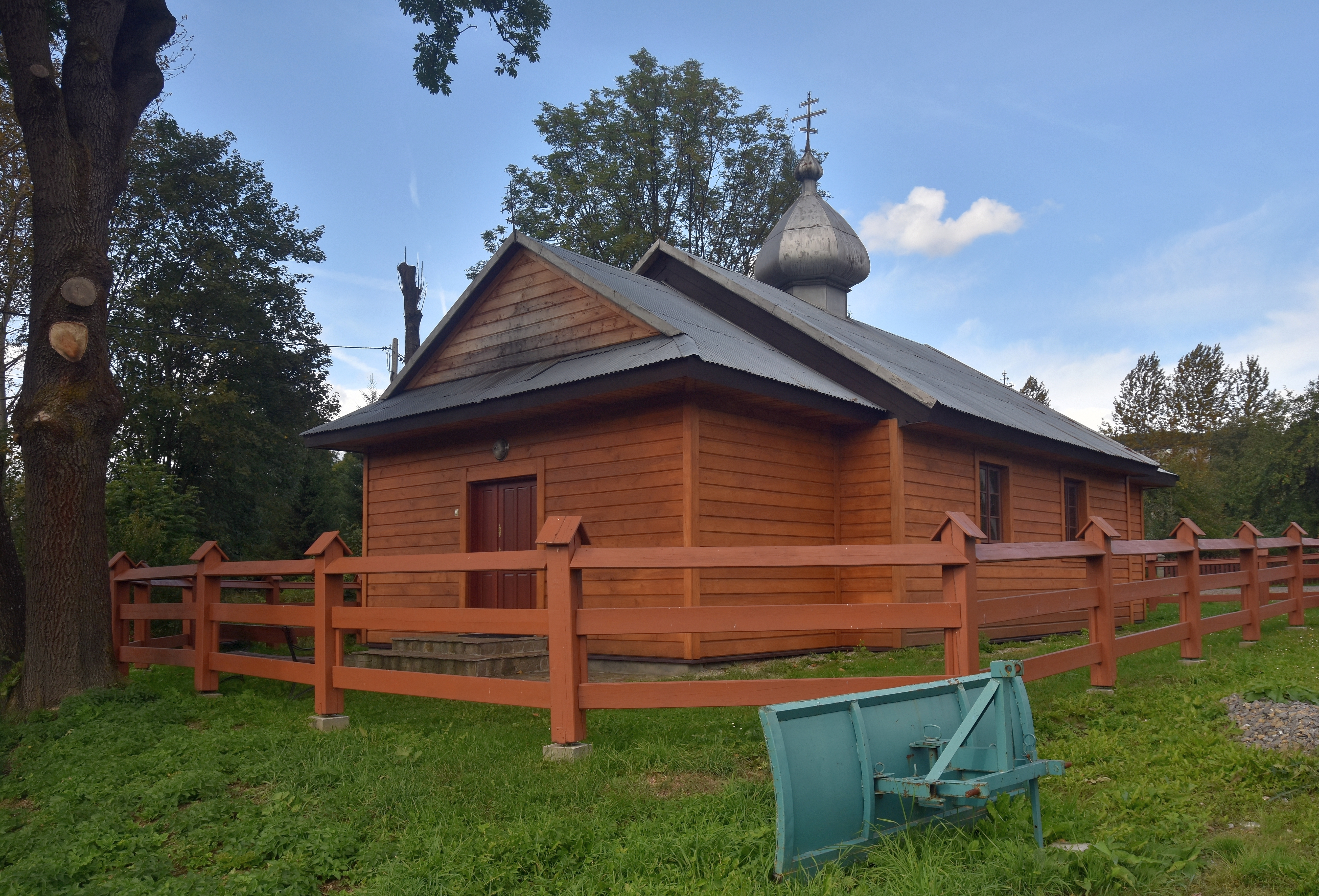 Kwiatoń, cerkiew prawosławna św. Paraskewy